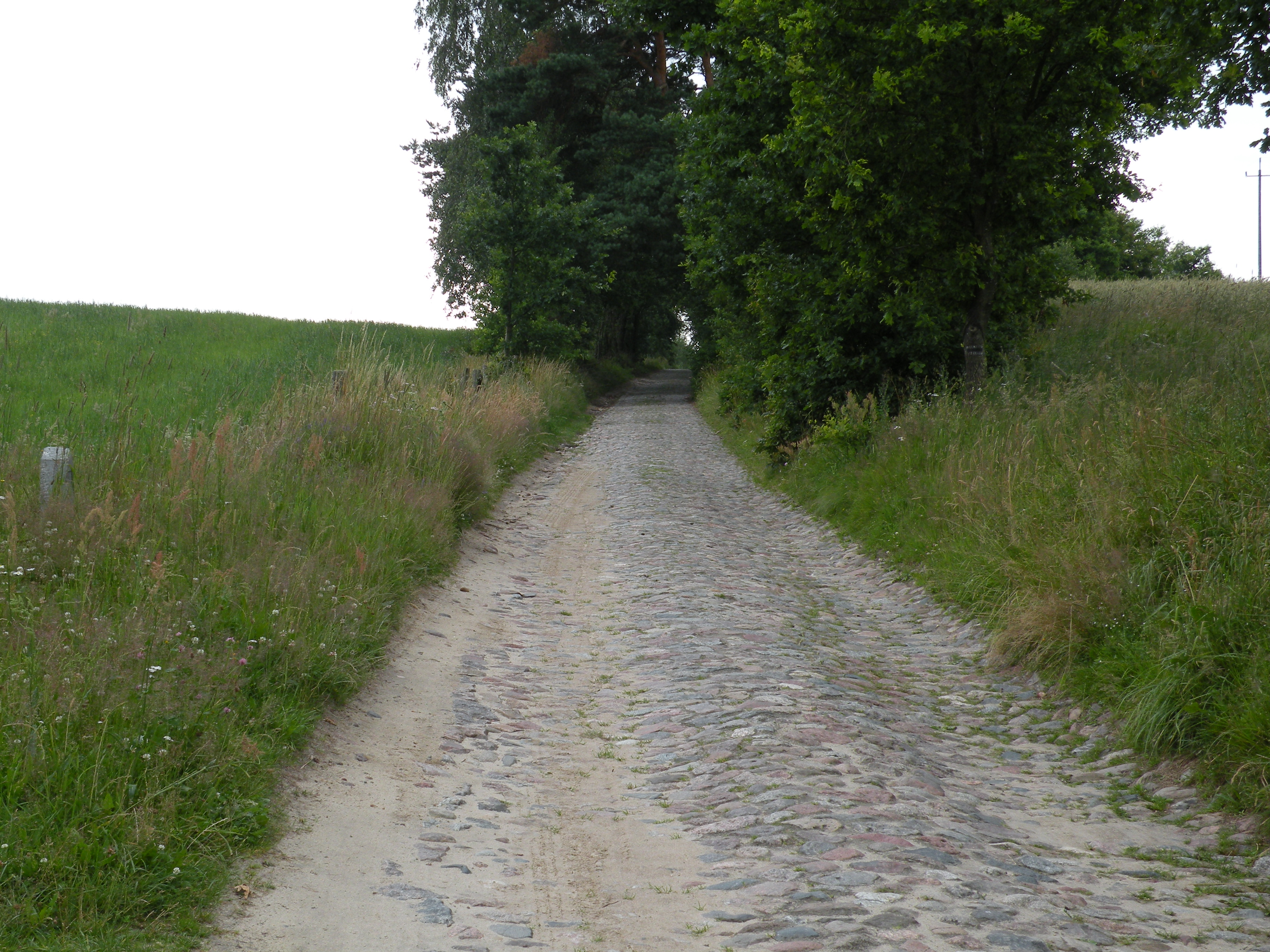 Brukowana droga w Pomysku Wielki, droga w kierunku na jezioro Stary Staw